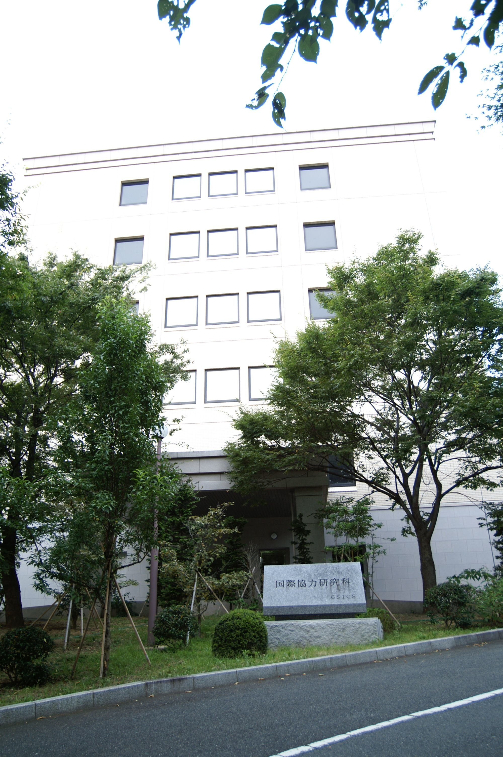 神戸大学大学院国際協力研究科(六甲台第五学舎)。 (2006/08/12 Kobe, Hyogo, JAPAN)